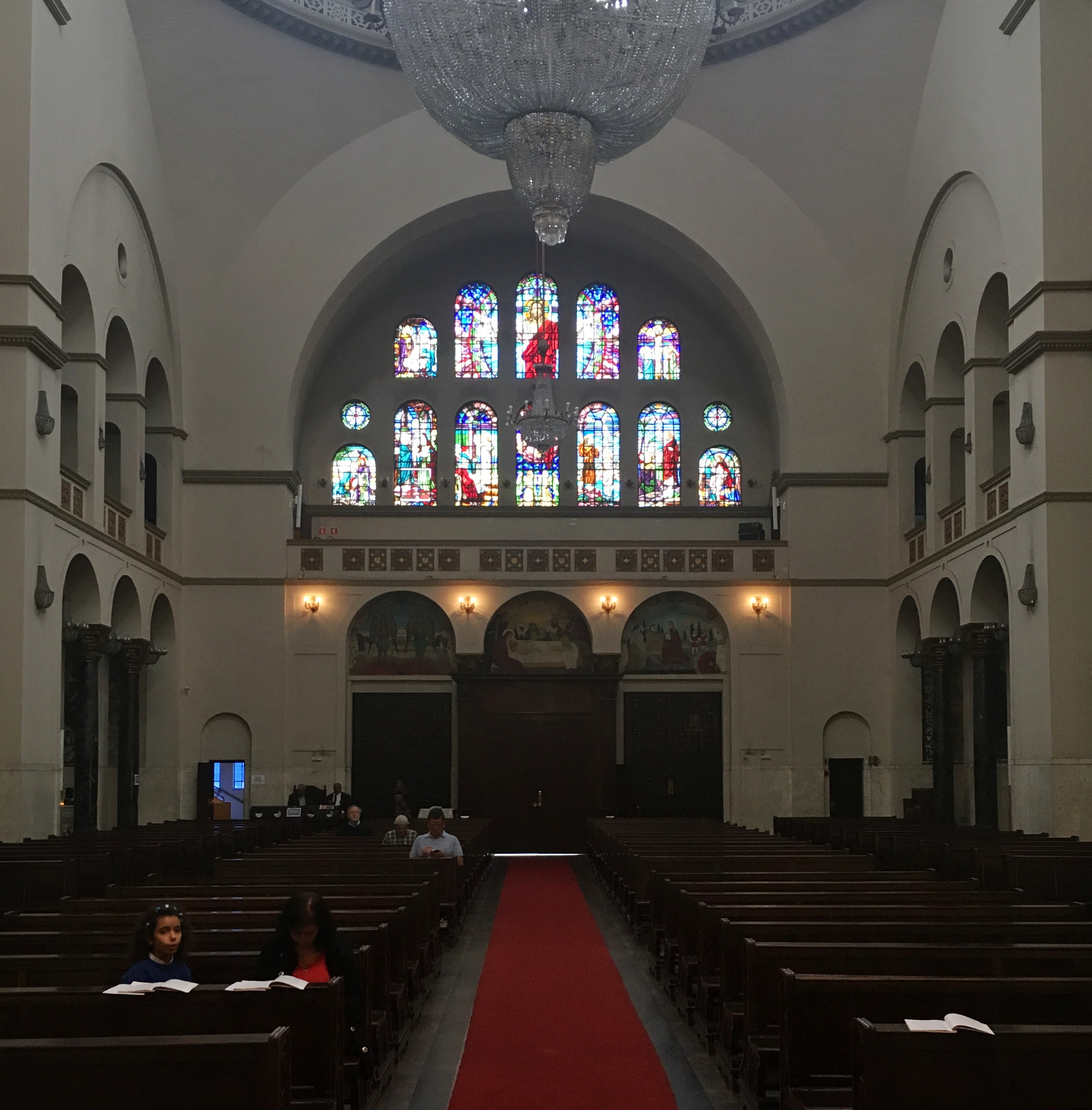 Área total da nave da Catedral vista da parte de trás.